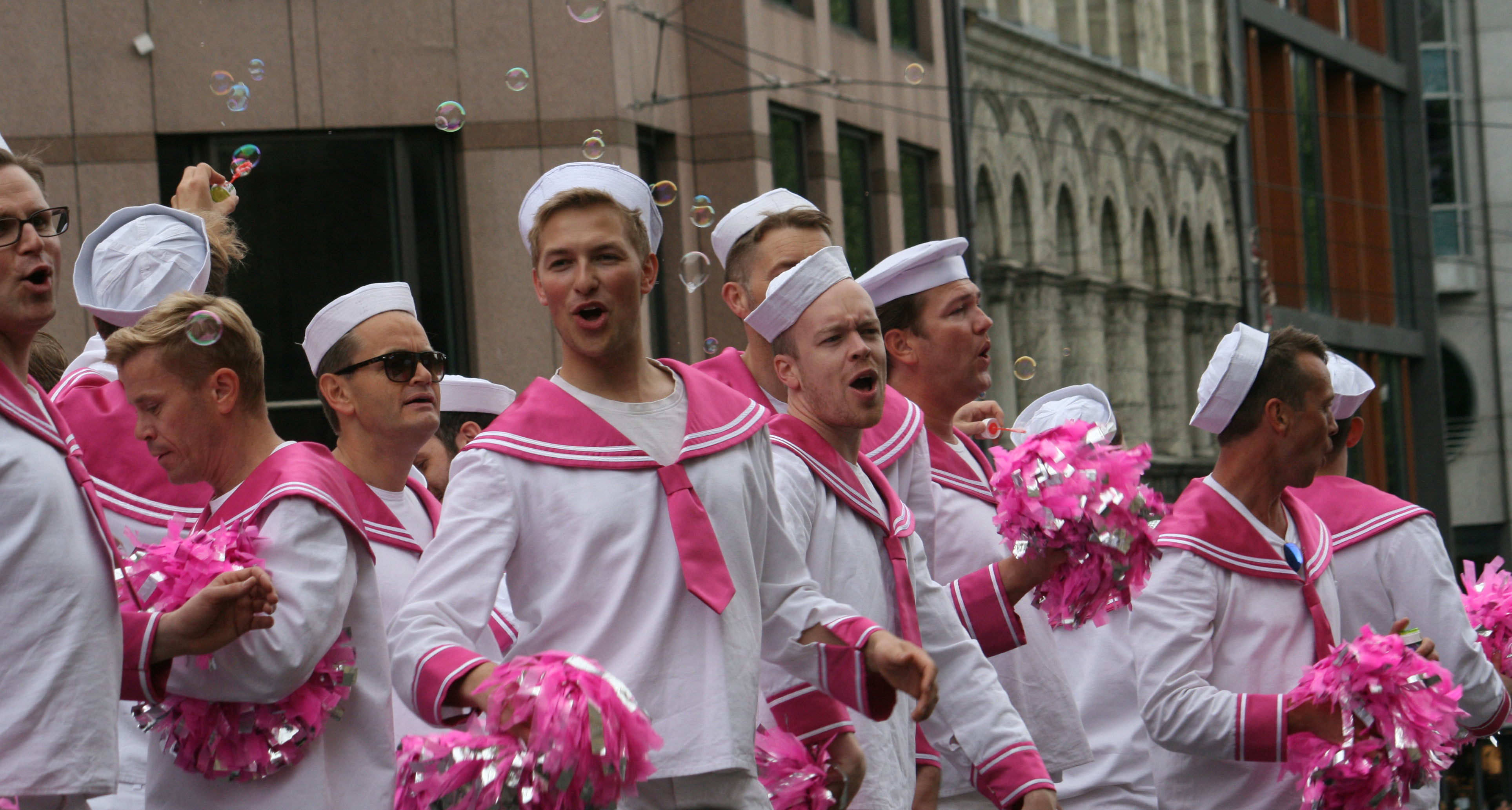 Oslo fagottkor under Europride-paraden i Oslo 2014